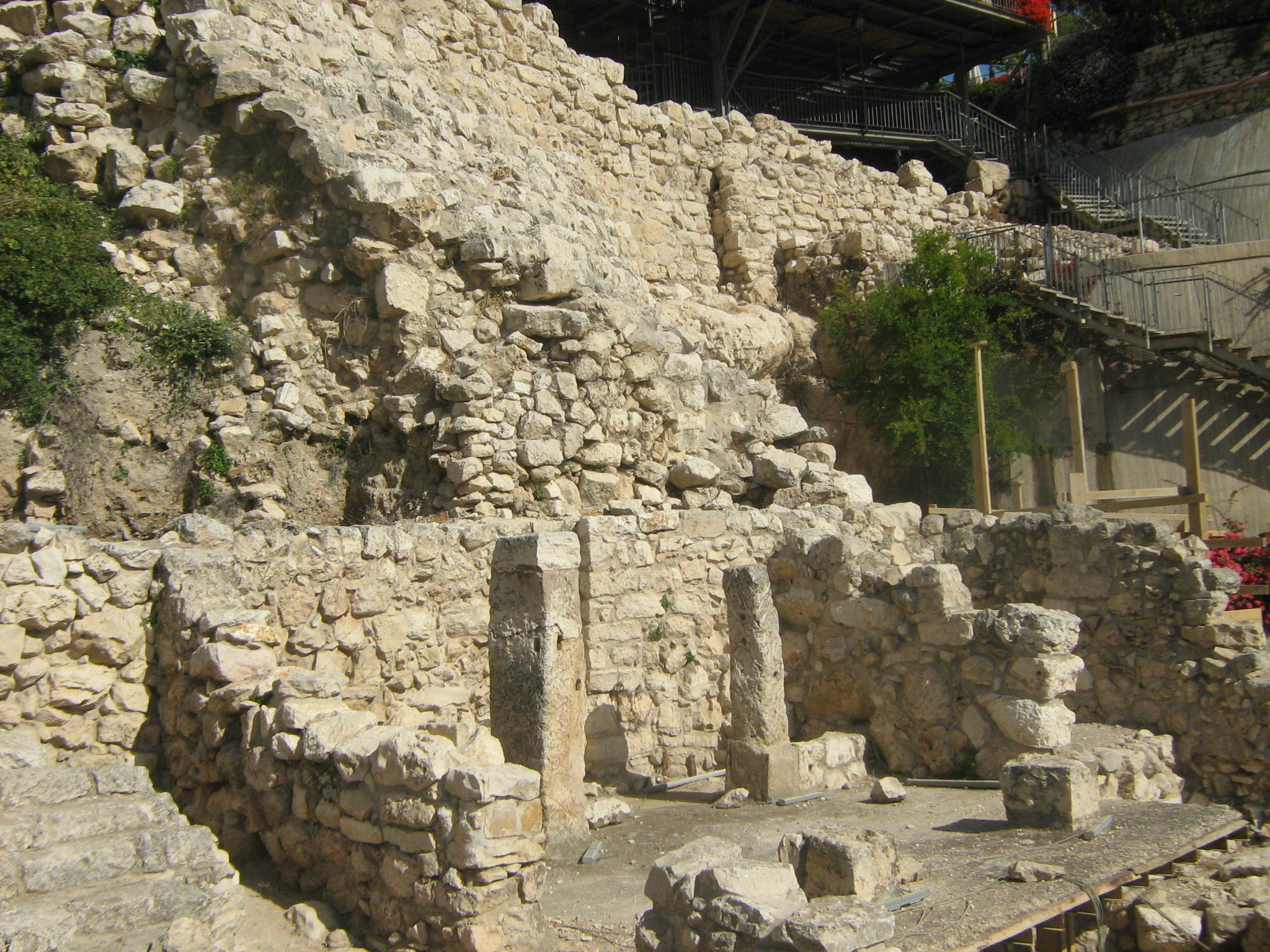 Город Давида-дом Ехиеля